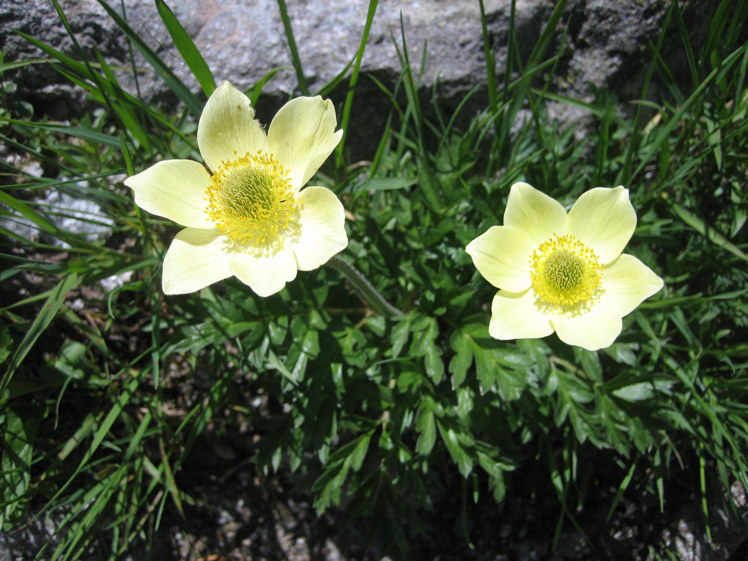 Pulsatilla alpina subsp. apiifolia